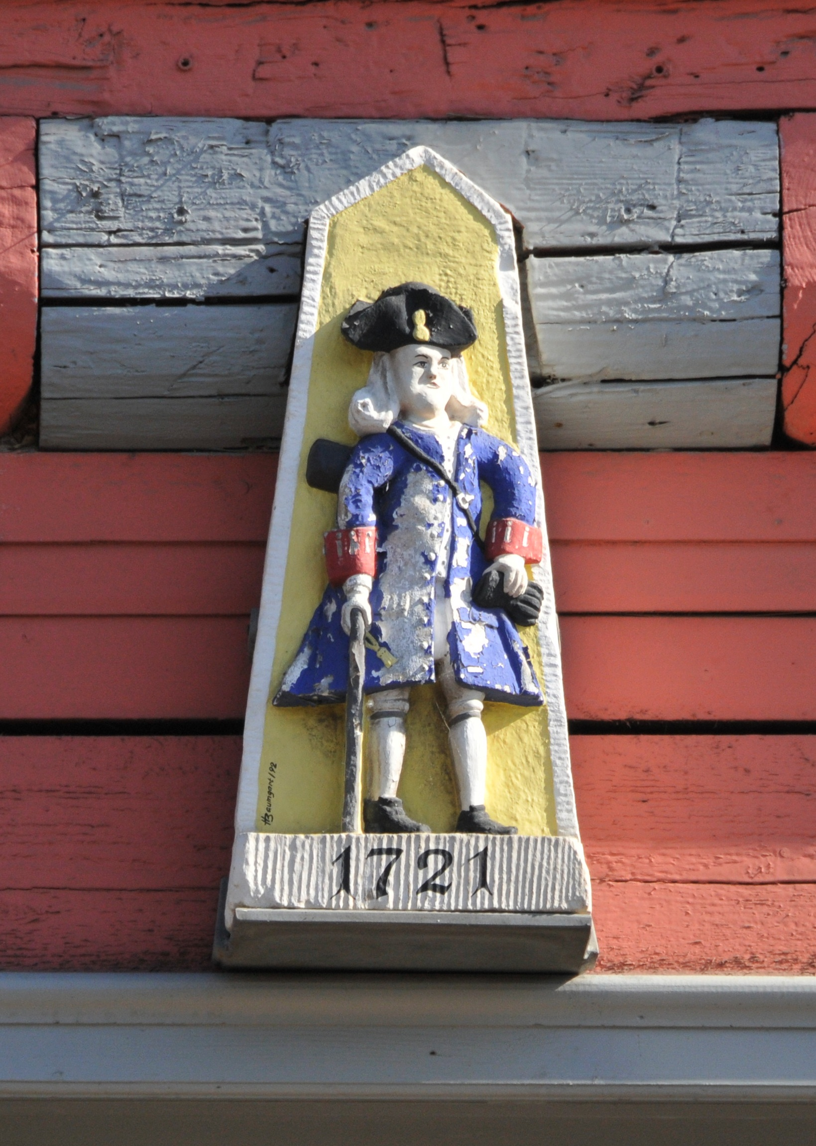 Wandersleben, Reliefstein über der Rathaustür